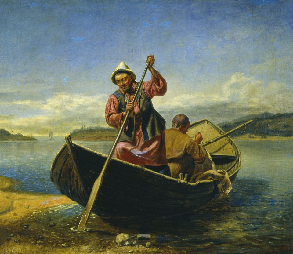 Попов Андрей Андреевич - Киргизы на Волге